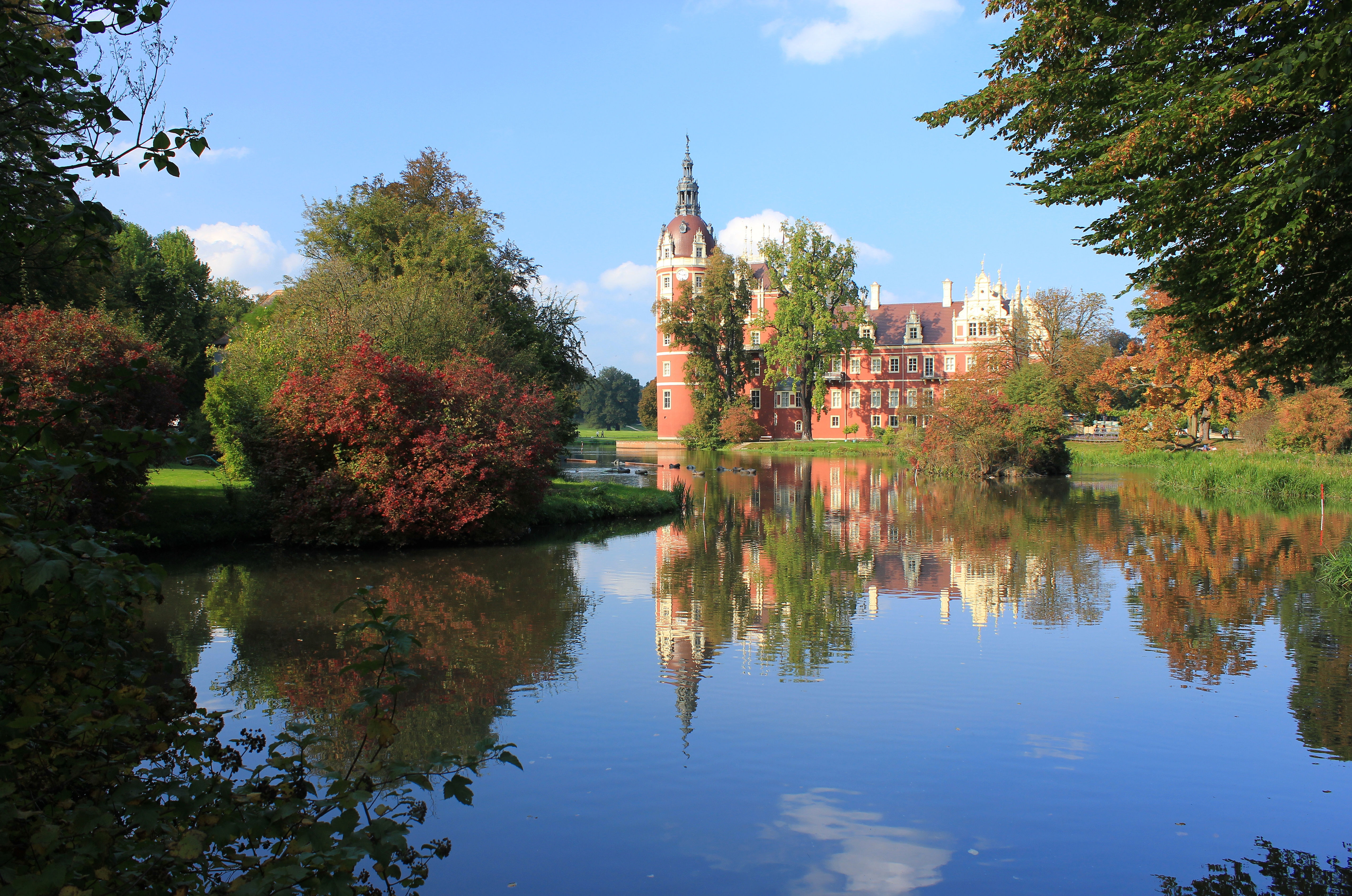 Fürst-Pückler-Park im Bad Muskau. Sachsen. Weltkulturerbe.